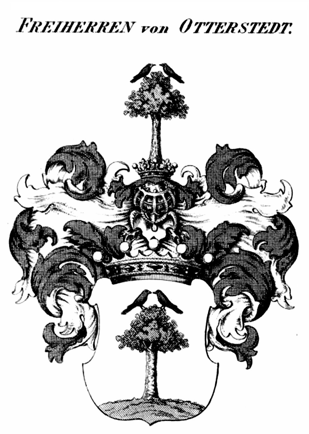 Herb szlachecki baronów von Otterstedt. Grafika z 1820 r.